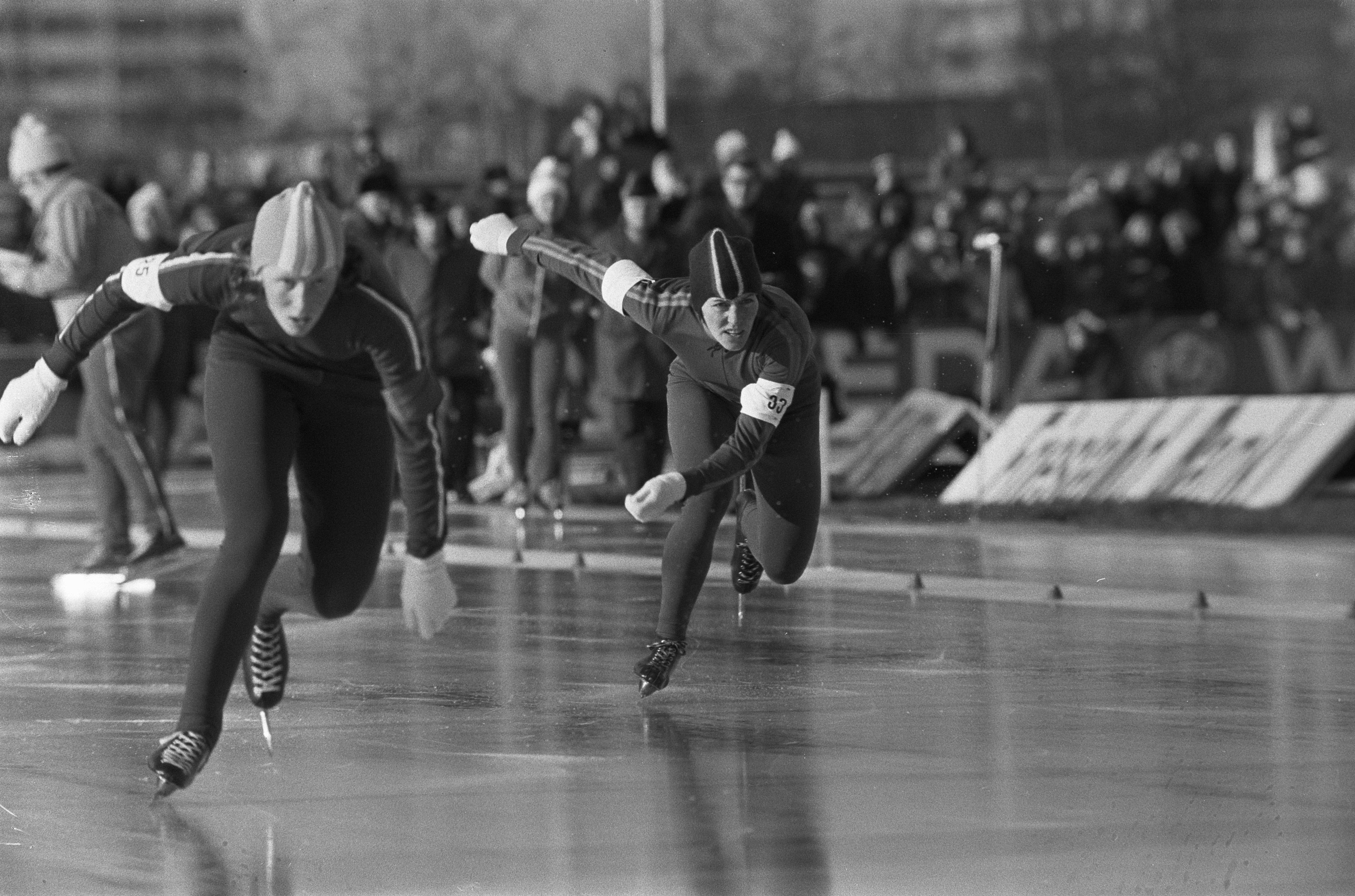 Collectie / Archief : Fotocollectie Anefo Reportage / Serie : Wereldkampioenschap schaatsen dames te Heerenveen Beschrijving : Atje Keulen- Deelstra (rechts) in actie Datum : 23 februari 1974 Locatie : Friesland, Heerenveen Trefwoorden : schaatsen, sport, wereldkampioenschappen Persoonsnaam : Keulen- Deelstra, Atje Fotograaf : Fotograaf Onbekend / Anefo Auteursrechthebbende : Nationaal Archief Materiaalsoort : Negatief (zwart/wit) Nummer archiefinventaris : bekijk toegang 2.24.01.05 Bestanddeelnummer : 927-0235 Left skater = Connie Carpenter-Phinney, who rode the 1500m against Atje Keulen-Deelstra (see here)